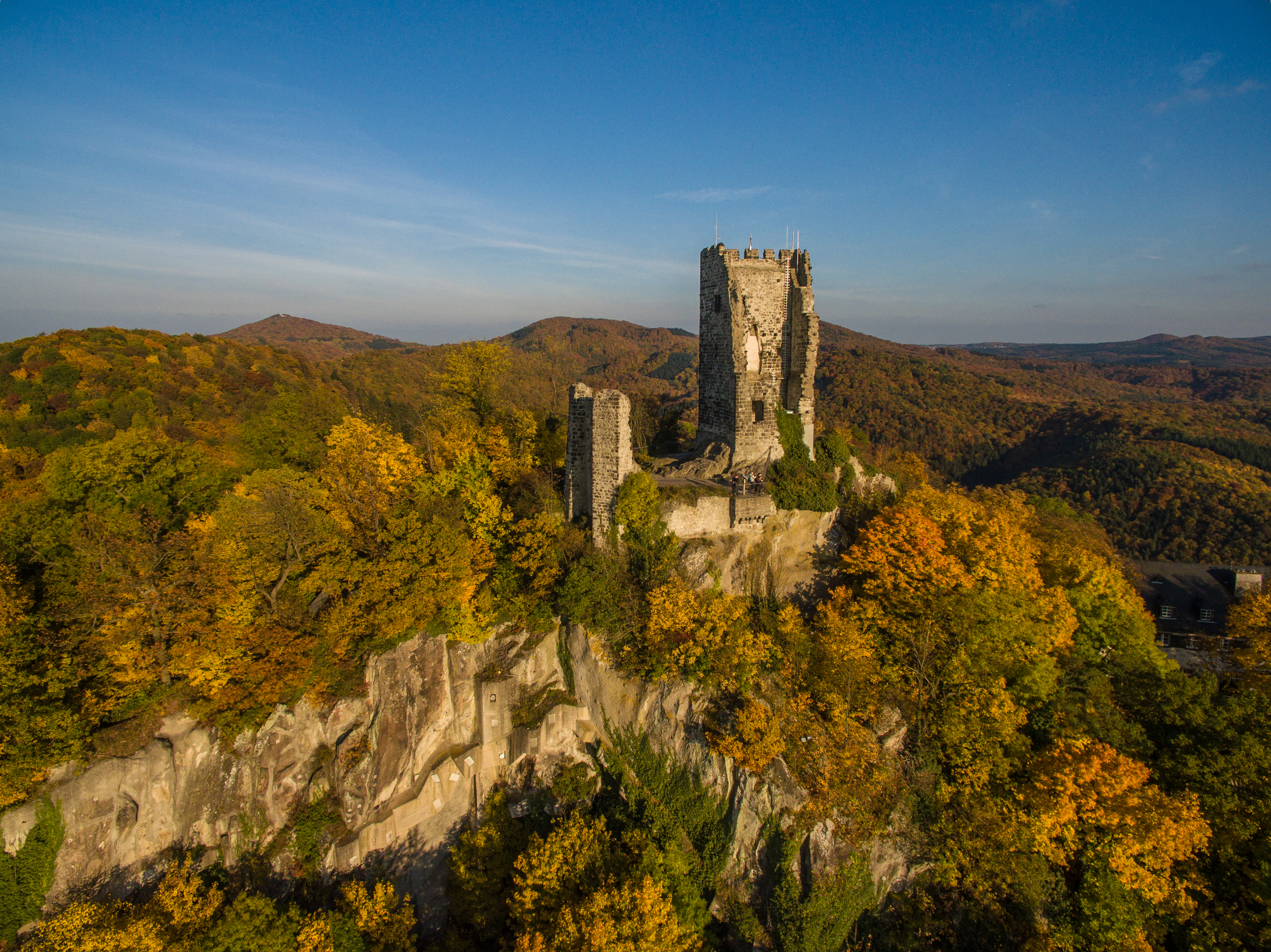 Luftaufnahme der Burgruine Drachenfels in Königswinter